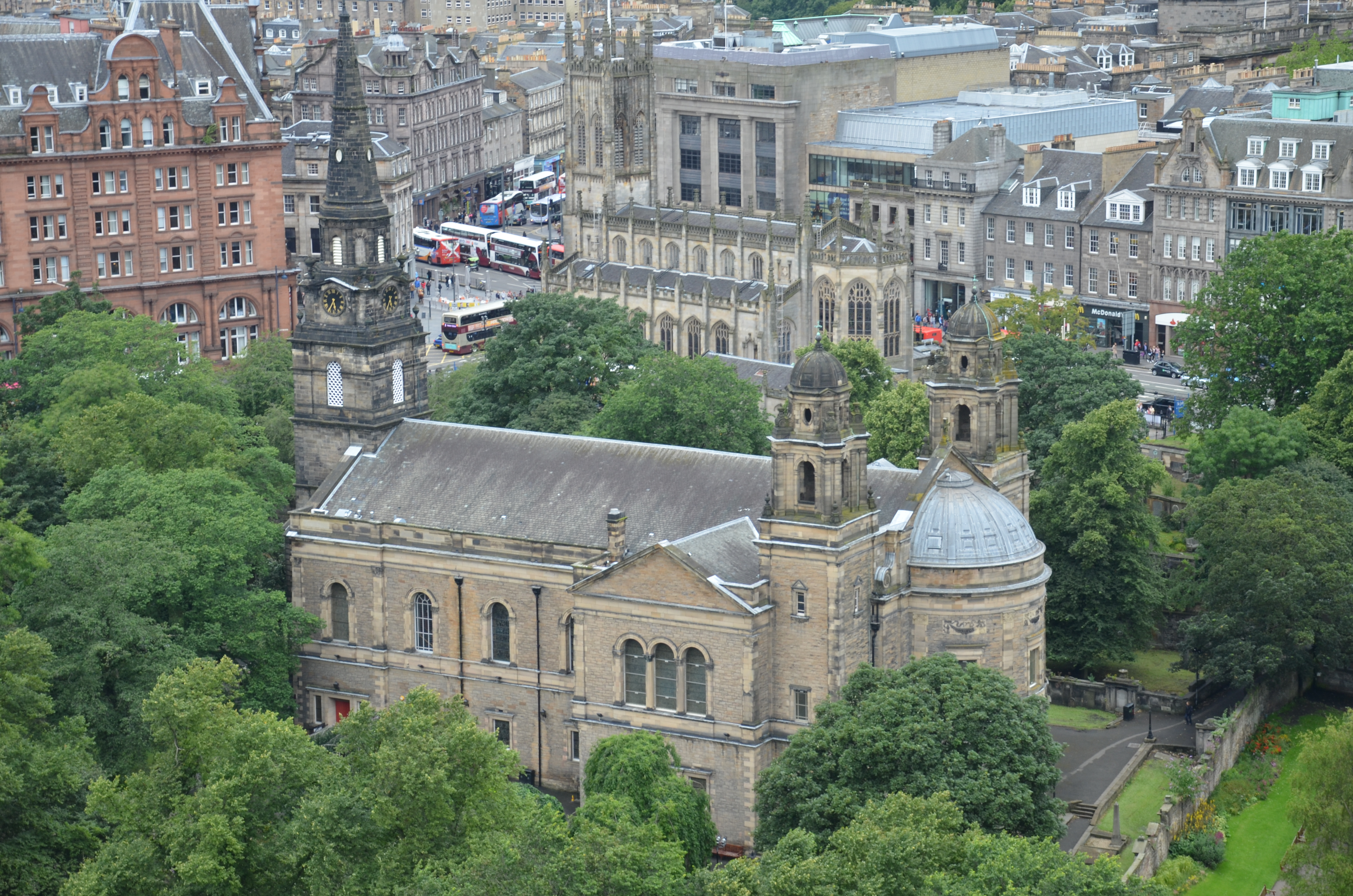 Edinburgh - 2016